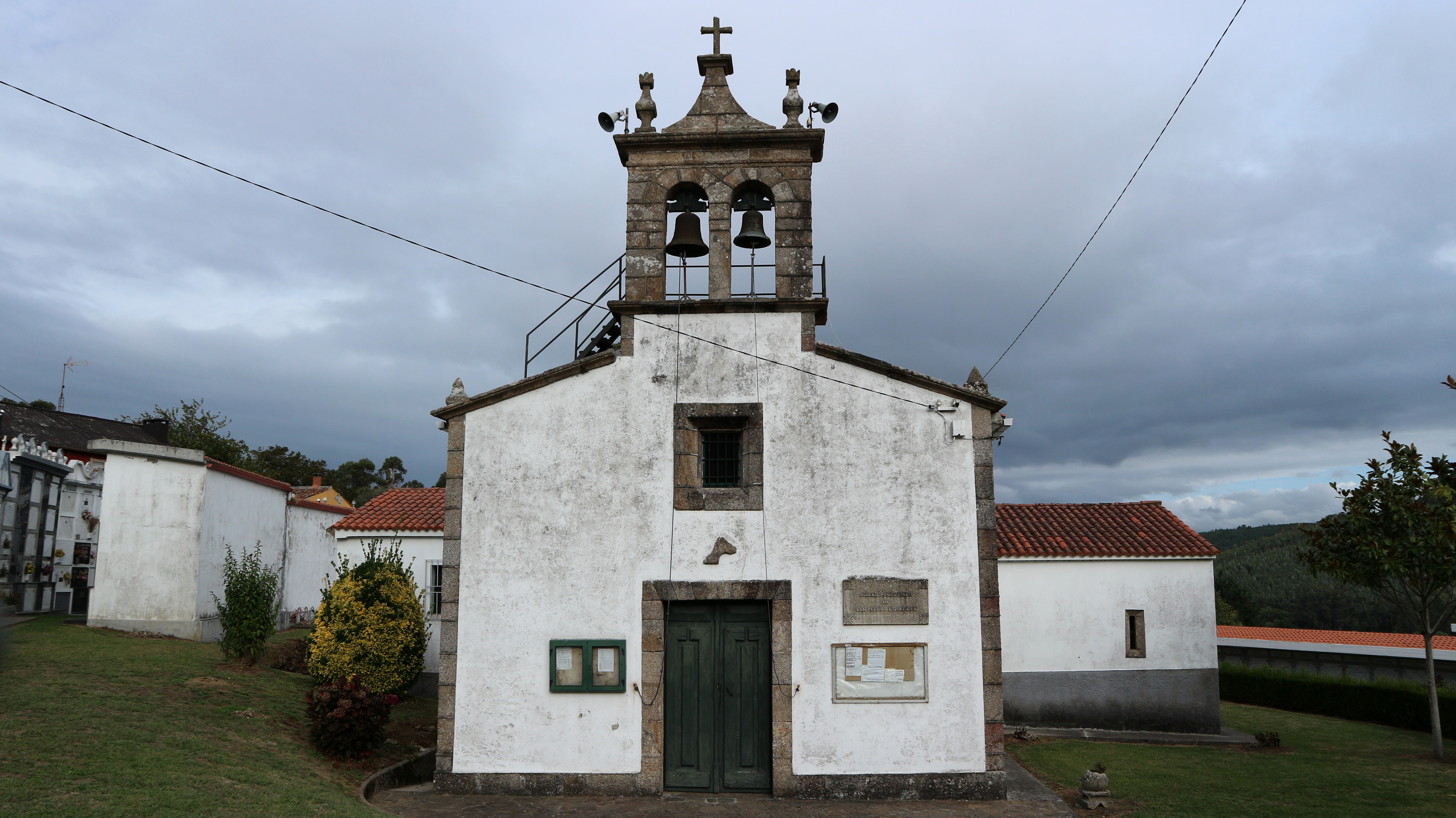 Igrexa de San Pedro de Quembre. A Eirexa, Quembre, Carral.